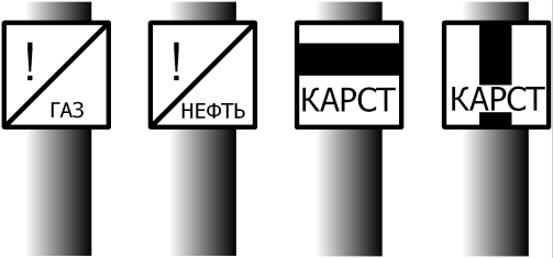 Железнодорожные сигналы «Пересечение с газопроводом», «Пересечение с нефтепроводом», «Начало карстоопасного участка», «Конец карстоопасного участка»